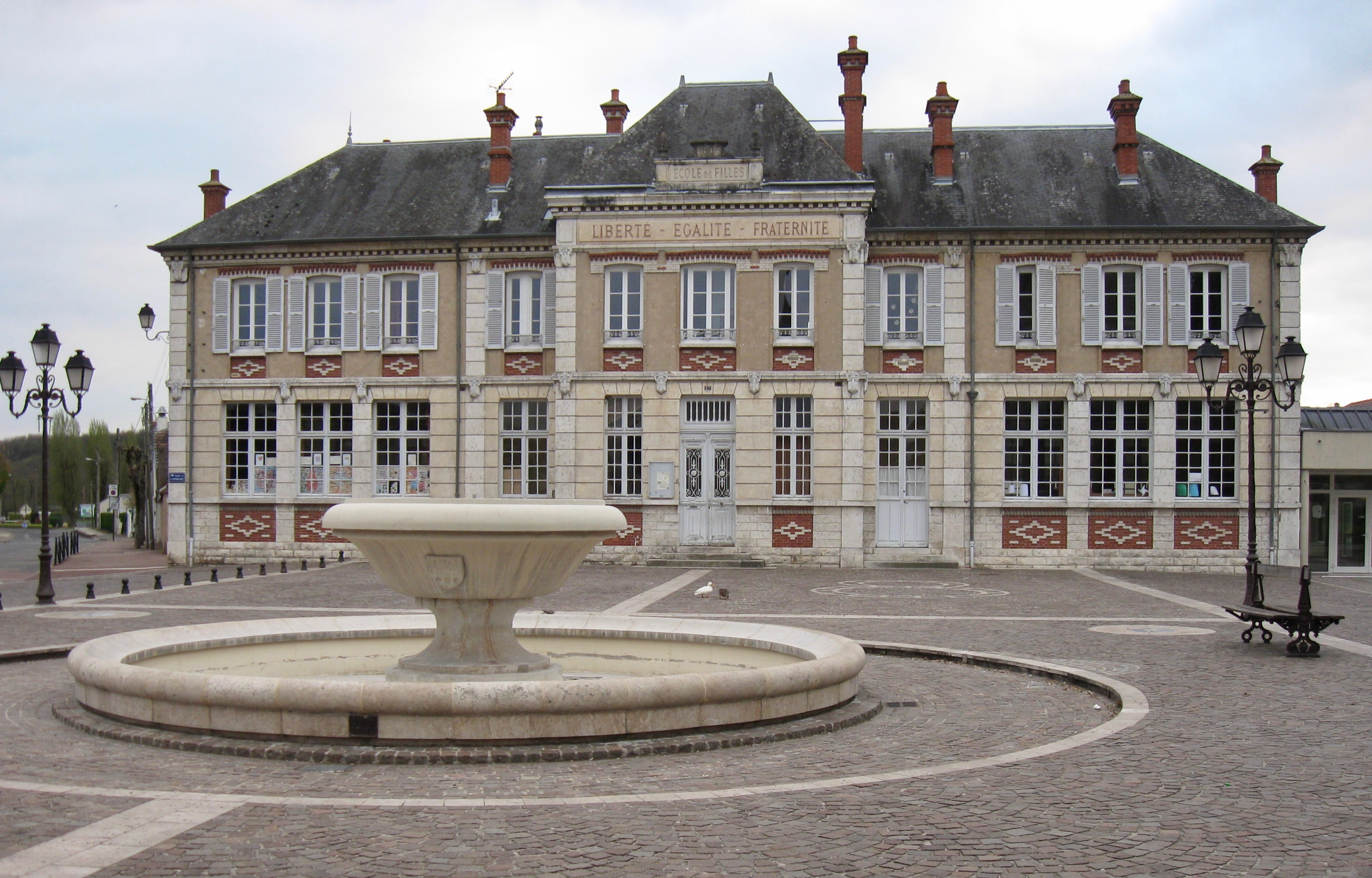 L'école des filles, place de l'église. (Souppes-s-Loing, département de la Seine-et-Marne, région Île-de-France).